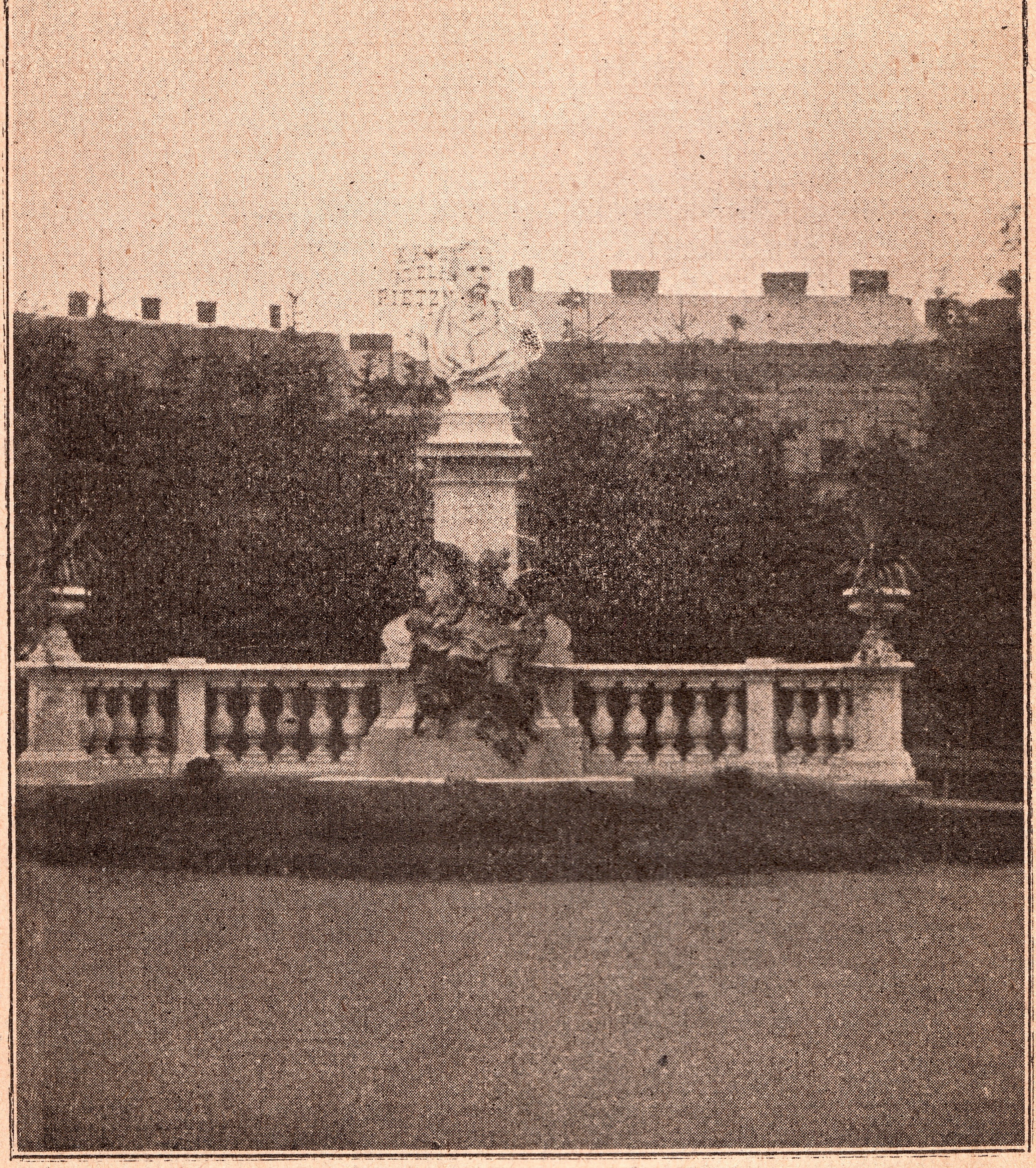 Winterhollerův pomník, park Koliště Brno